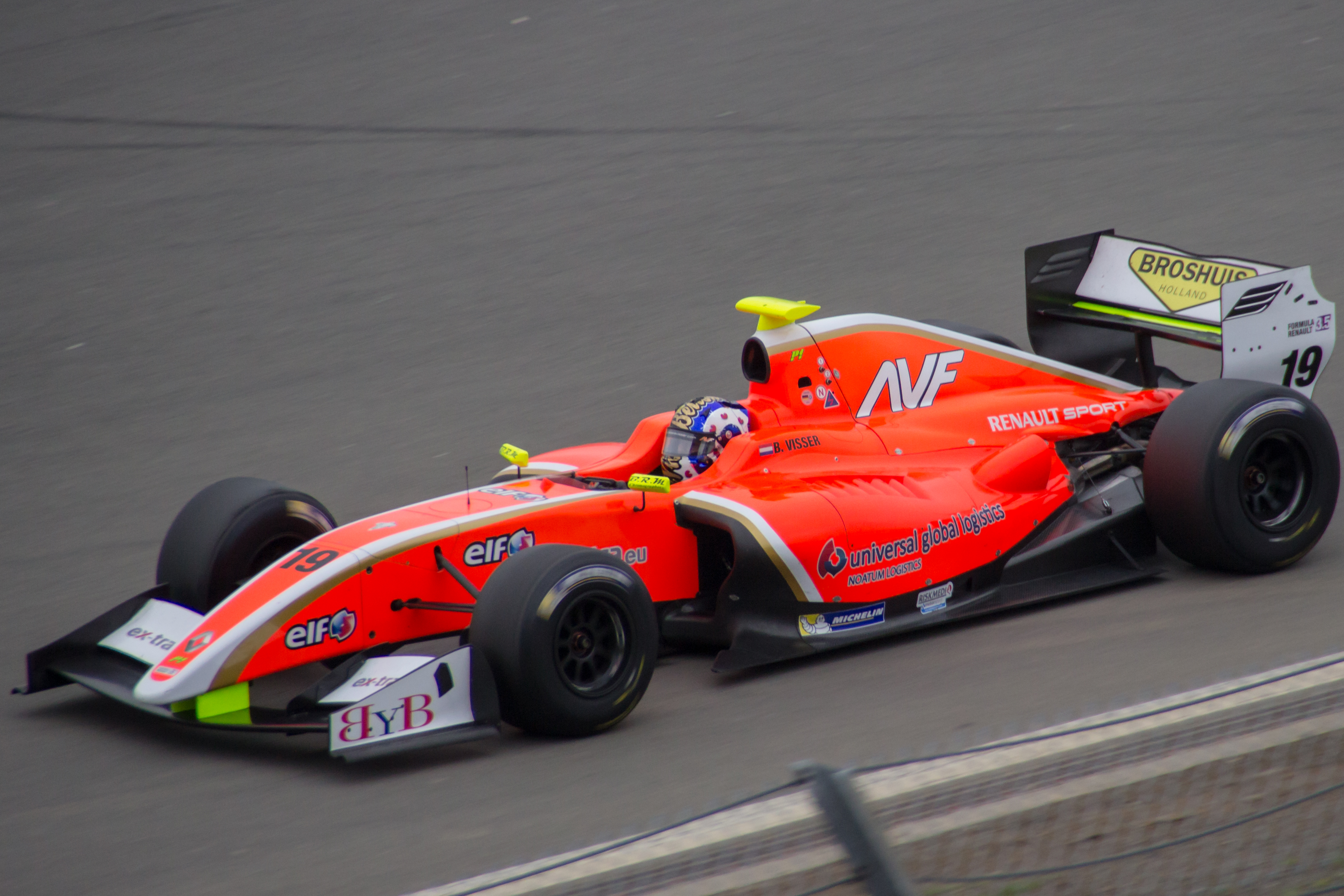 Beitske Visser bei der World Series by Renault auf dem Nürburgring 2014